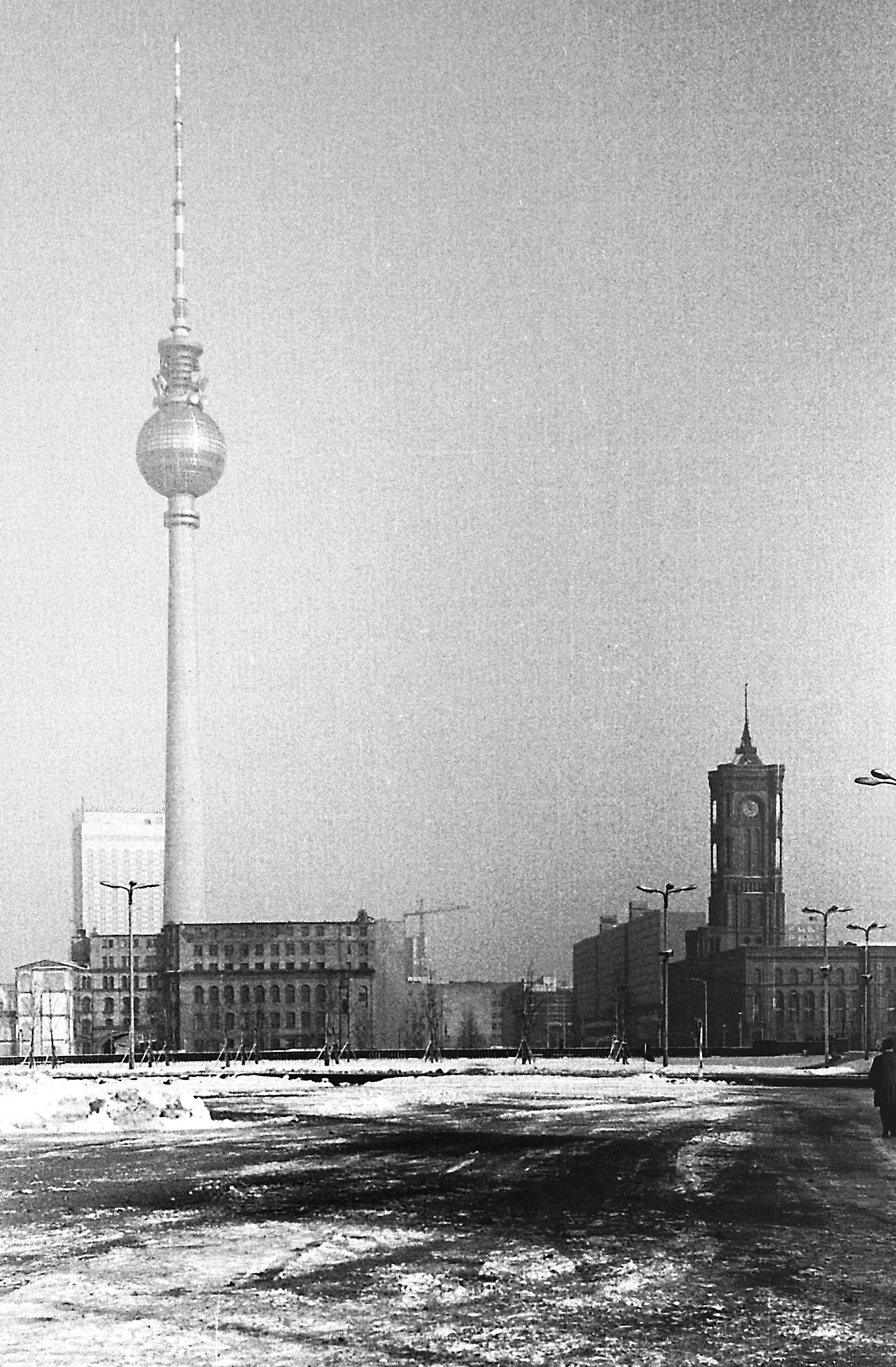 31.01.1970 Berlin (DDR): Blick vom Marx-Engels-Platz nach Nordosten zum Berliner Fernsehturm (GMP: 51.520804,13.409424). Er wurde am 03.10.1969 nach Planungen von Hermann Henselmann, Jörg Streitparth, Fritz Dieter, Günter Franke, Werner Ahrendt eröffnet. Gesamthöhe 368,03 m. Rechts das Rote Rathaus (GMP: 52.518480,13.408318). Links vor dem Fernsehturm Ruinen an der Spandauer Straße. [F19700131A014.jpg]19700131050NR.JPG(c)Blobelt